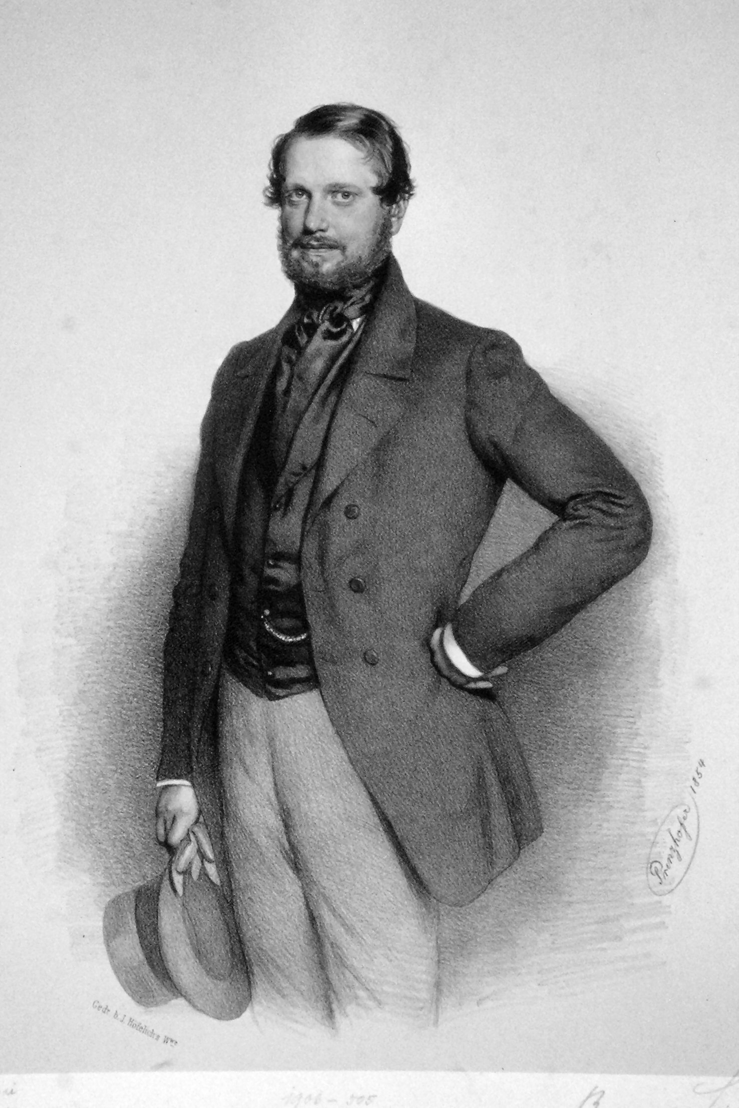 Simon Georg Freiherr von Sina (1810-1867)